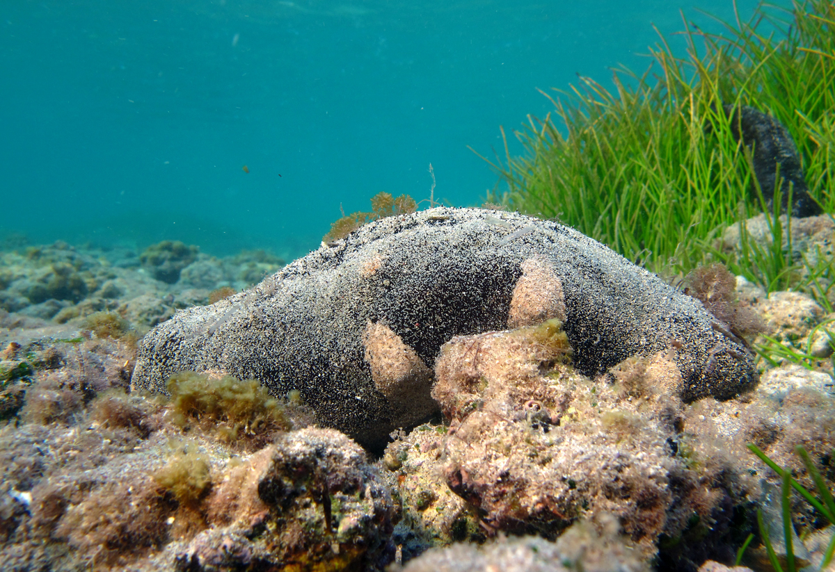 Holothurie Holothuria nobilis à la Réunion.